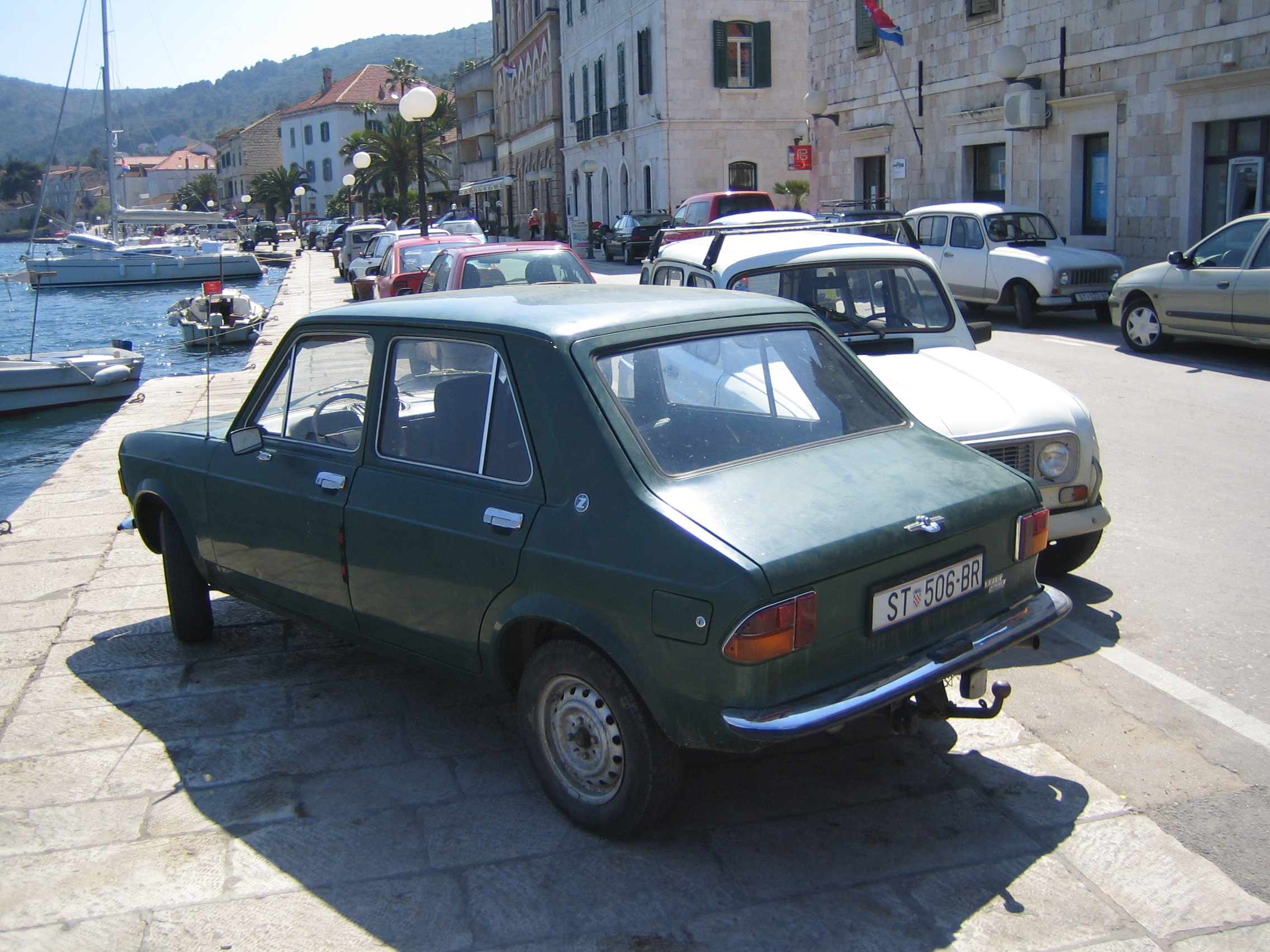 Zastava 101 Confort